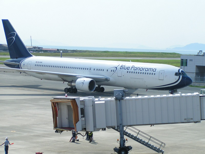 Blue Panorama Boeing767-3G5ER(EI-CXO) an Matsuyama(RJOM)